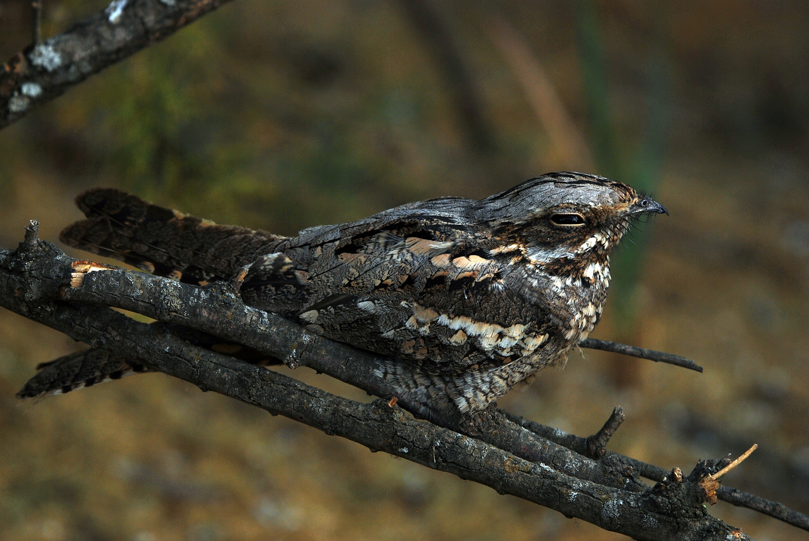 Kurdî: Li Qoruxçî ji aliyê min ve hatiye kişandin.